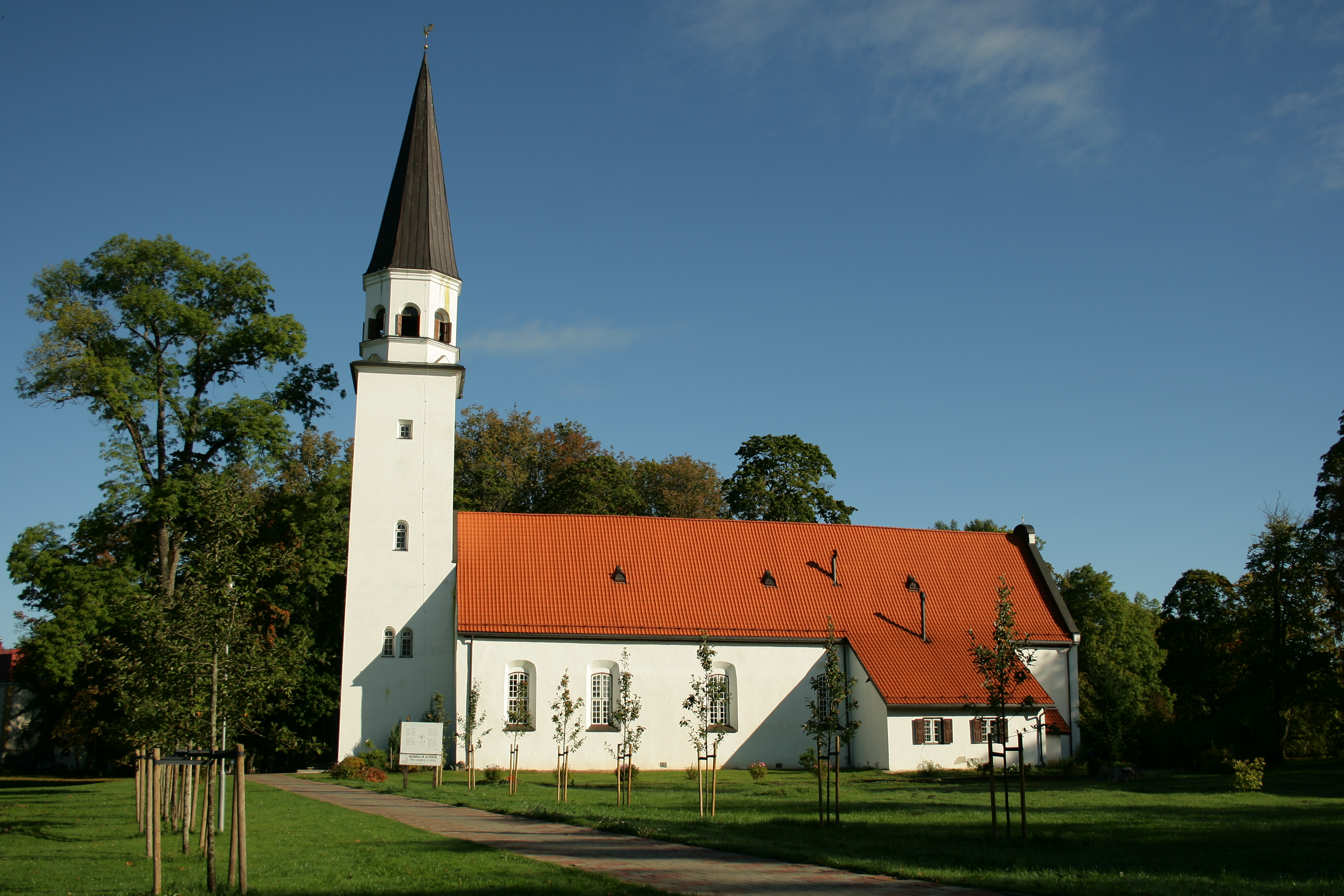 Siguldas luterāņu baznīca, Sigulda, Baznīcas iela 2